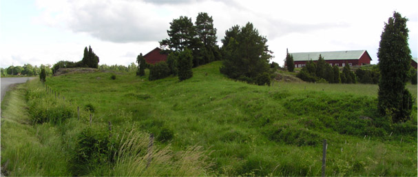 Götavirke vid Hageby gård (RAÄ-nr Västra Husby 12:1, Västra Husby socken, Hammarkinds härad, Söderköpings kommun, Östergötland,Sverige.